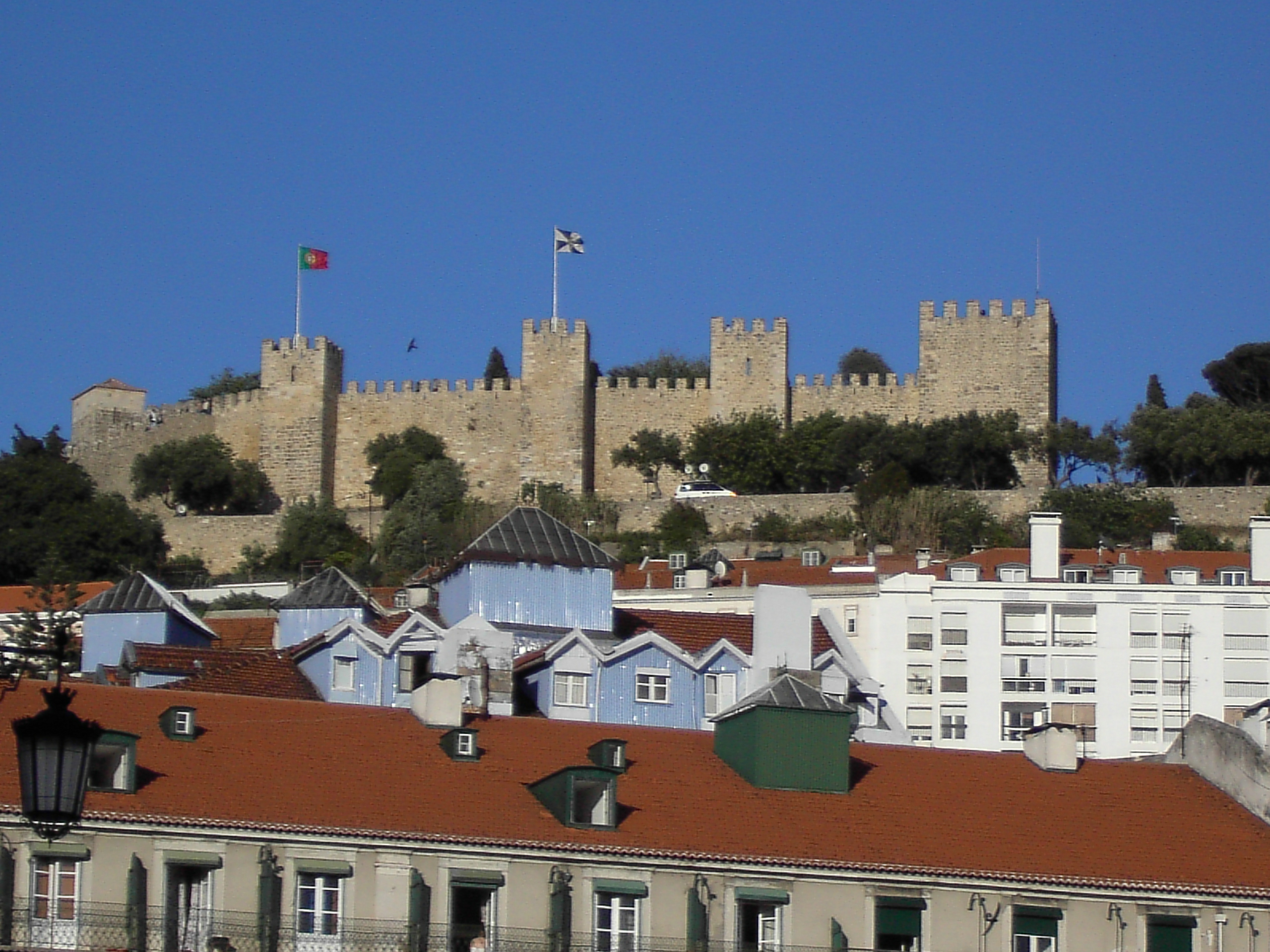 Lisboa, Castelo de São Jorge fom Praça da Figueira